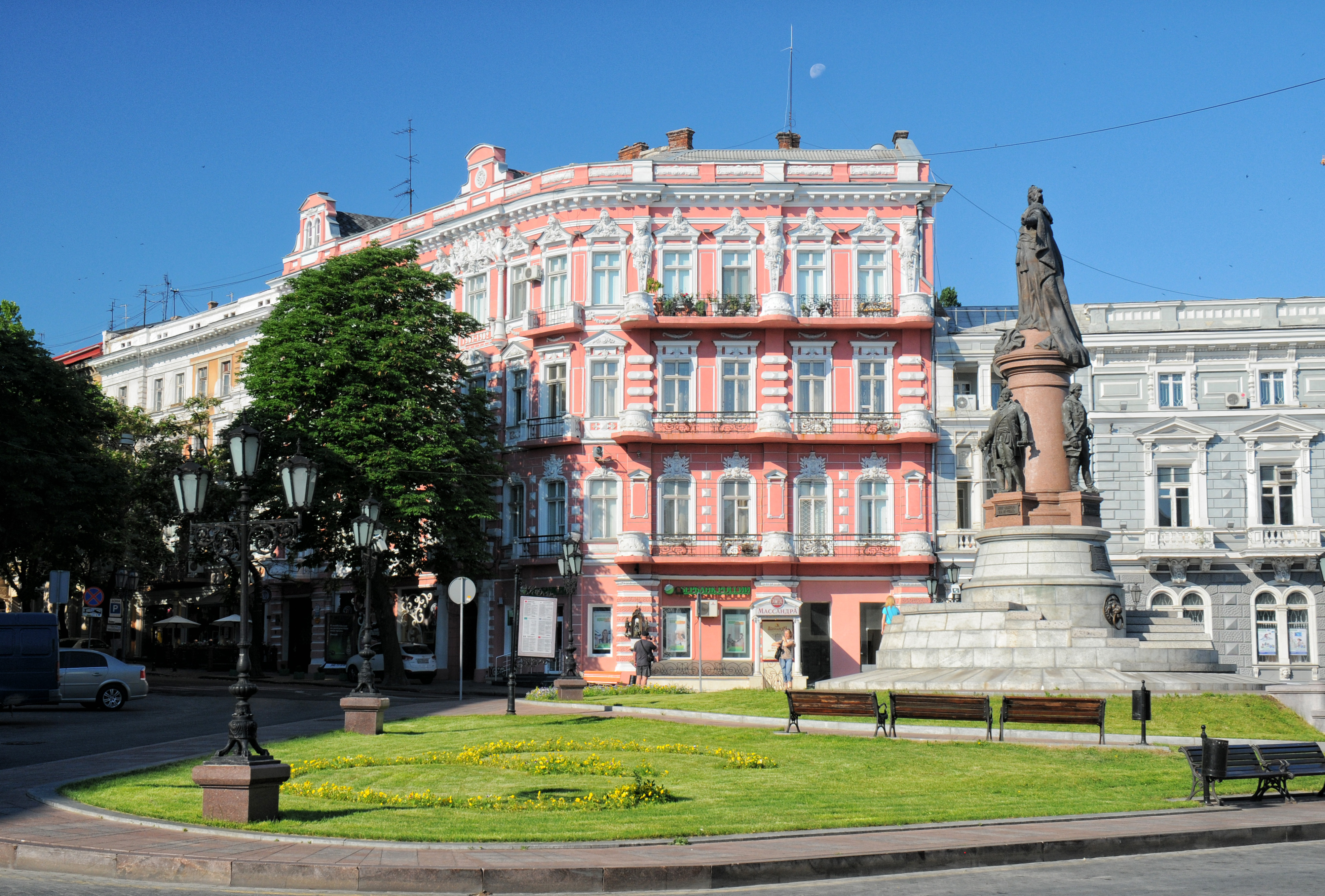 Одеса, Катерининська. 2